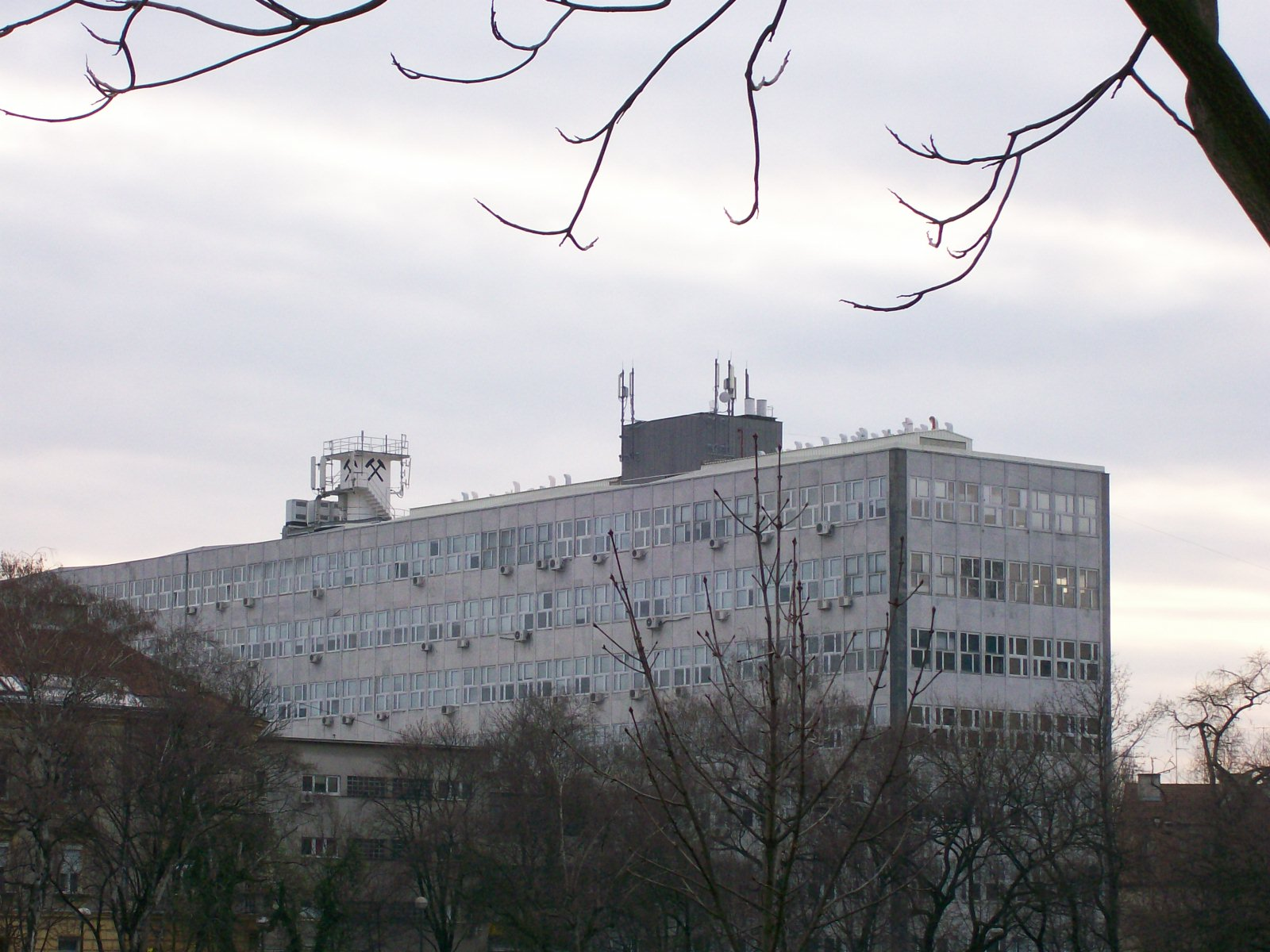 Rudarsko-geološko-naftni fakultet u Zagrebu